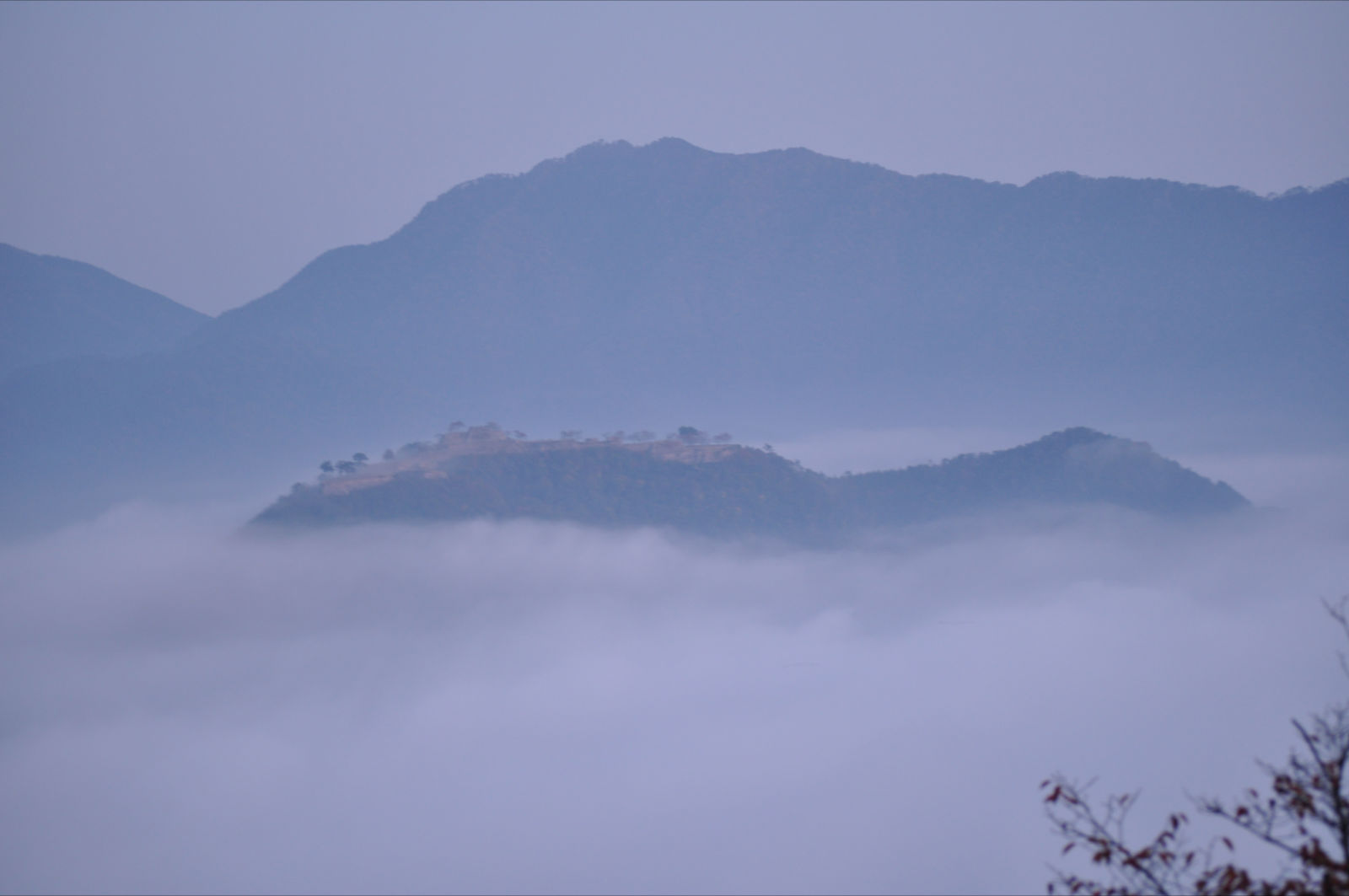 立雲峡から見た早朝の竹田城と雲海